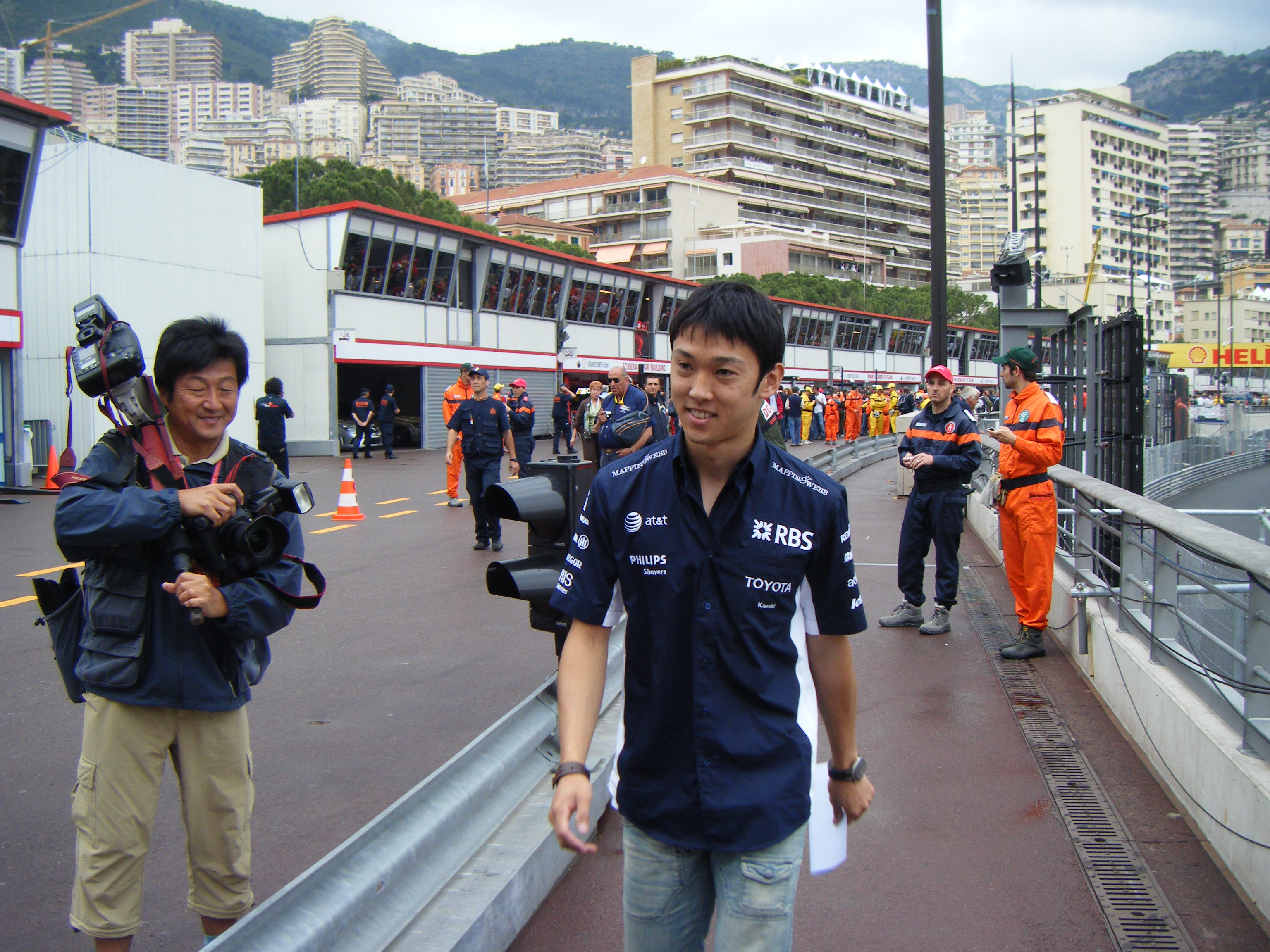 Kazuki Nakajima lors du GP de Monaco 2008.